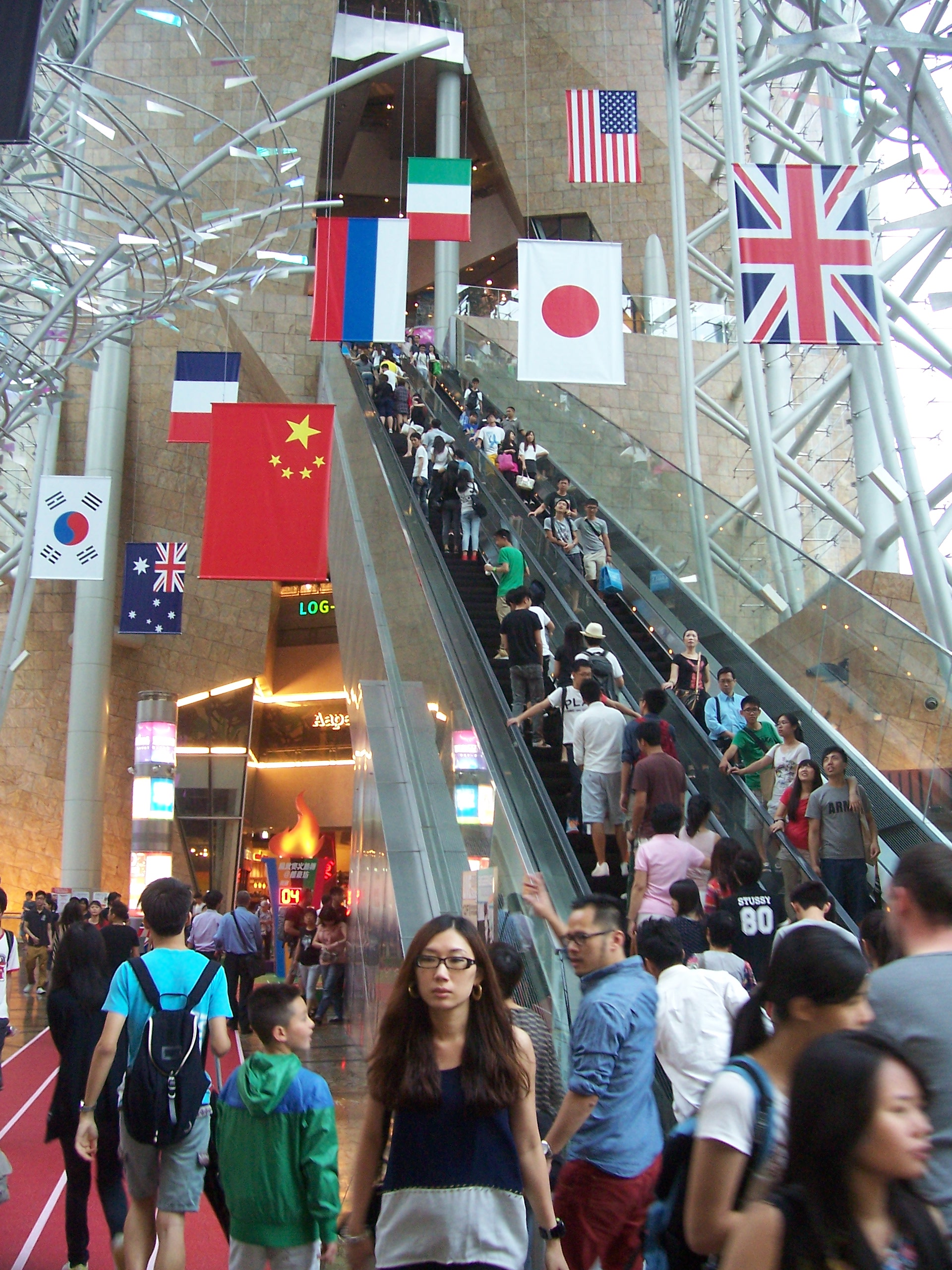 Supermarché Langham de Hong-Kong.